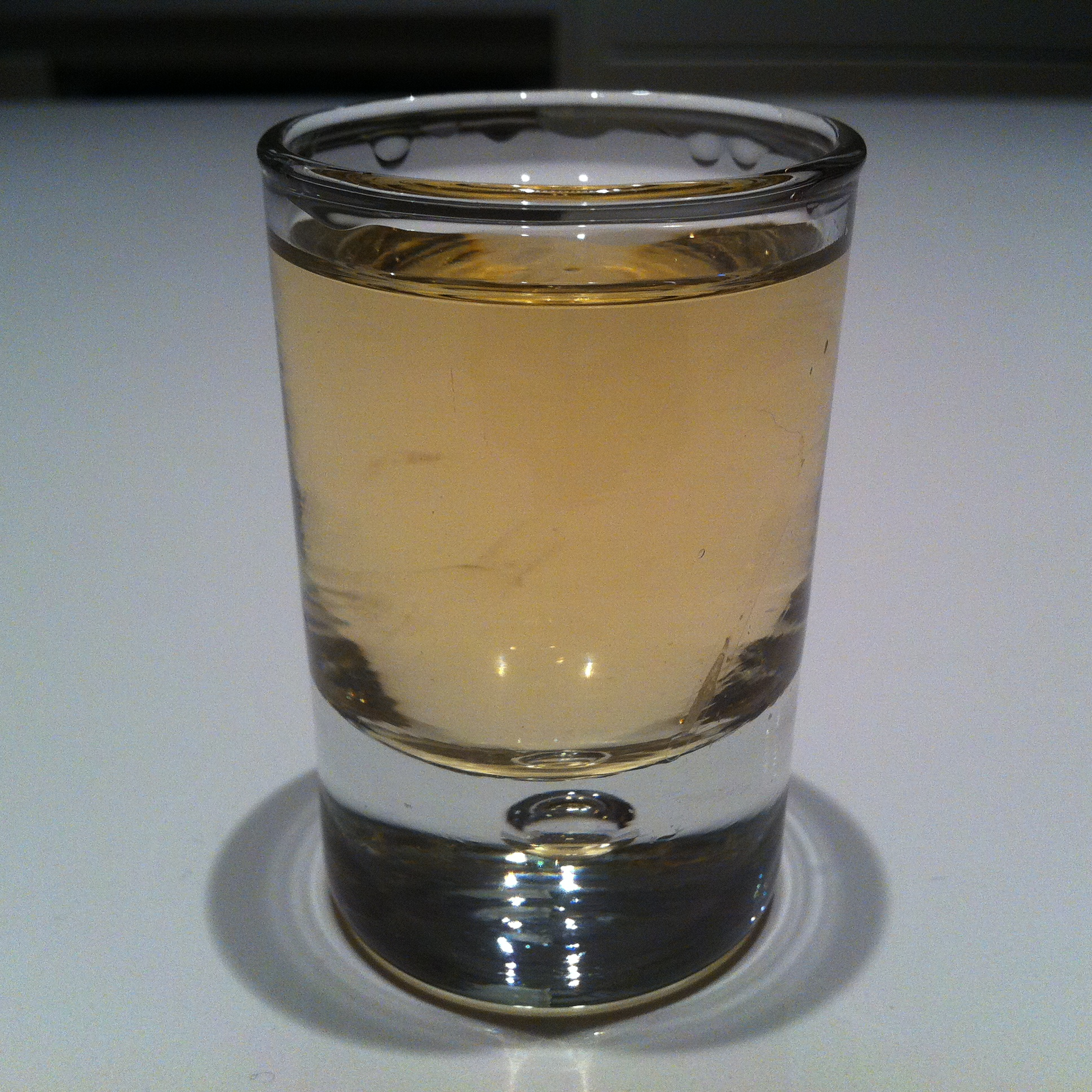 Chacha géorgienne, un alcool à base de raisin. Georgian chacha, a grape-based liquor